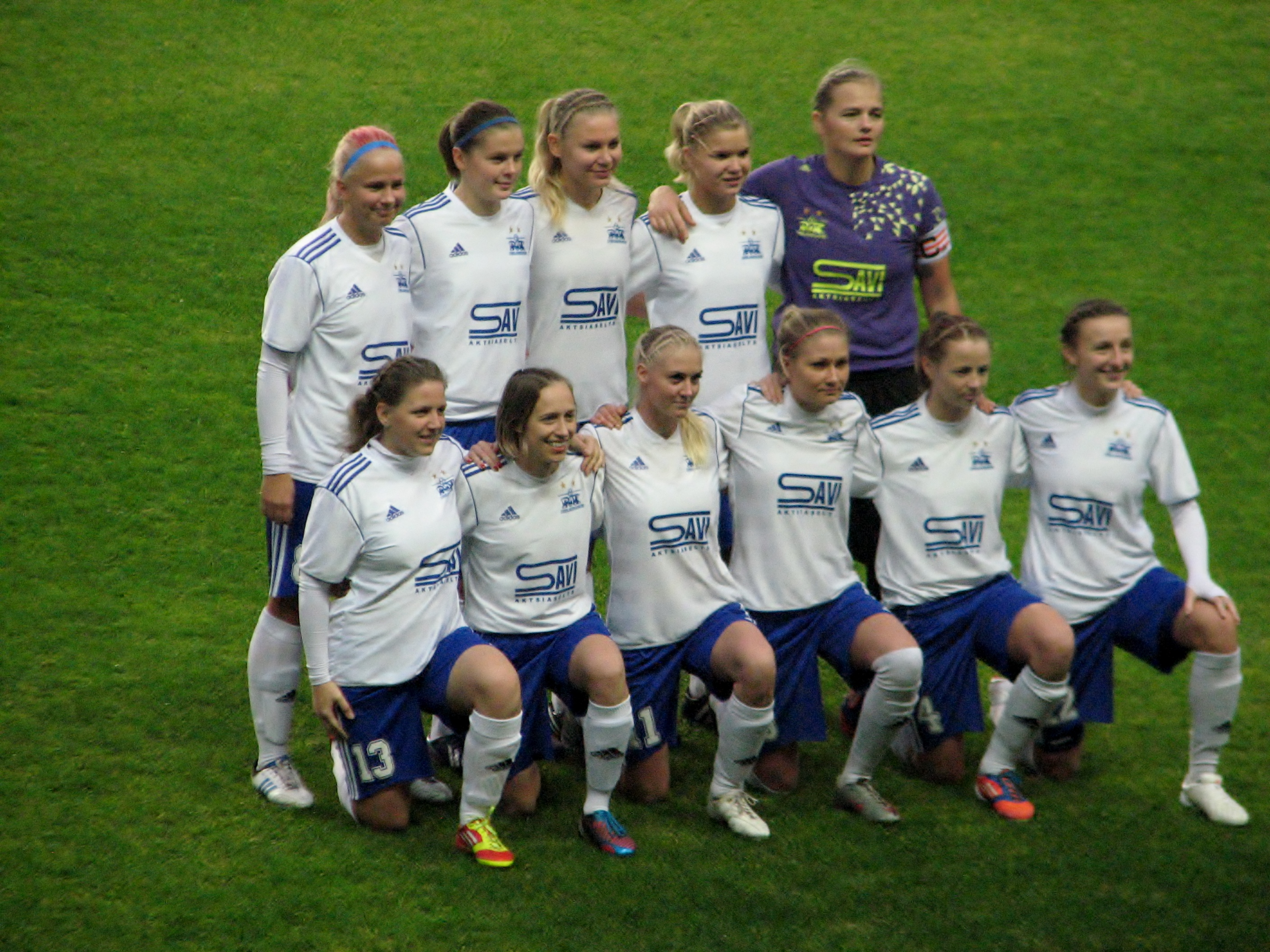 Pärnu JK naiskond vahetult enne mängu VfL Wolfsburgiga